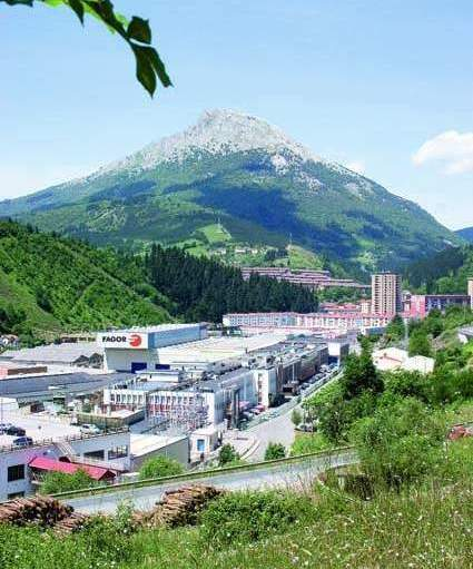 Fagor Arrasate S. Coop. Fabrica de Mondragon